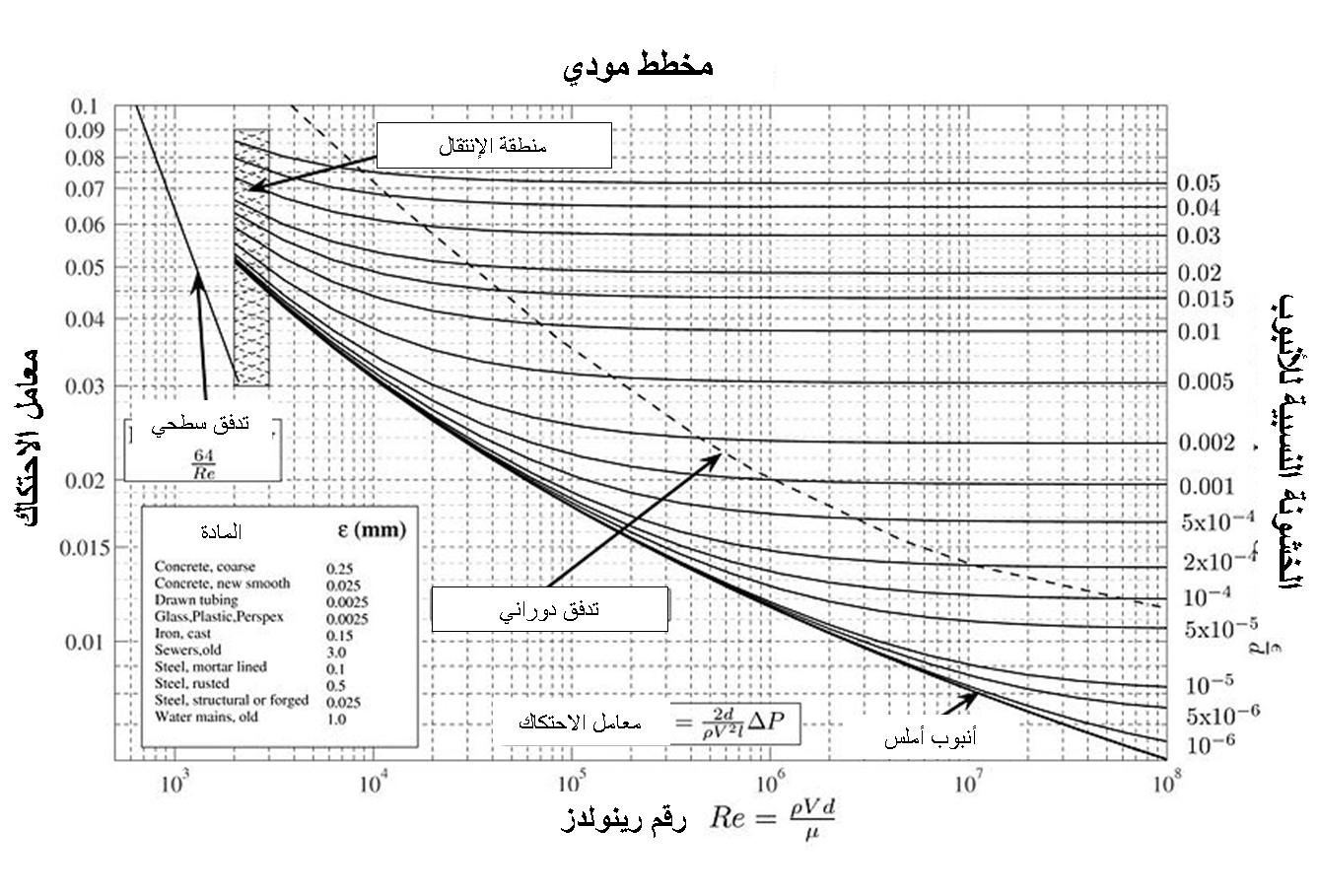 مخطط مودي باللغة العربية